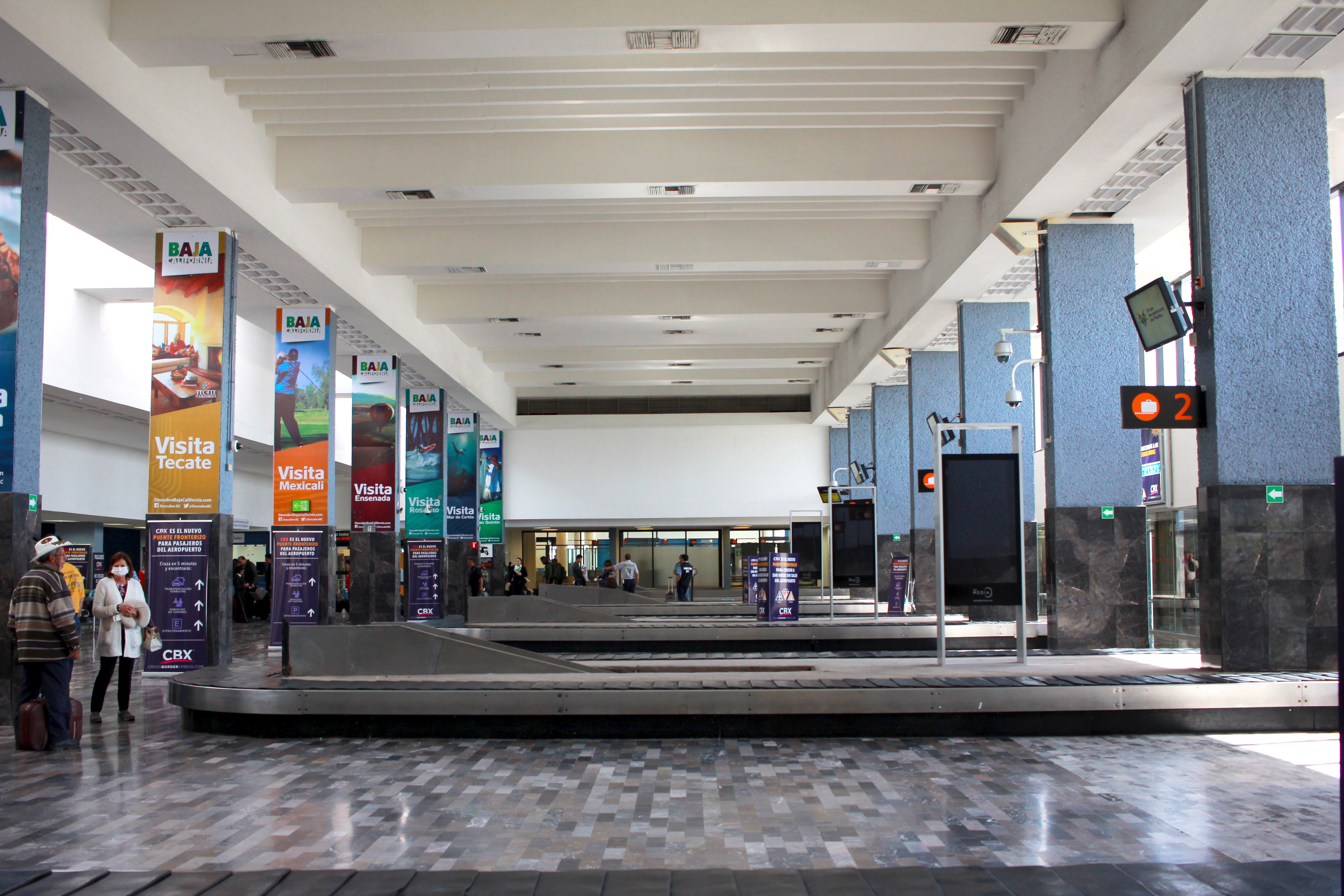 Aeropuerto de Tijuana